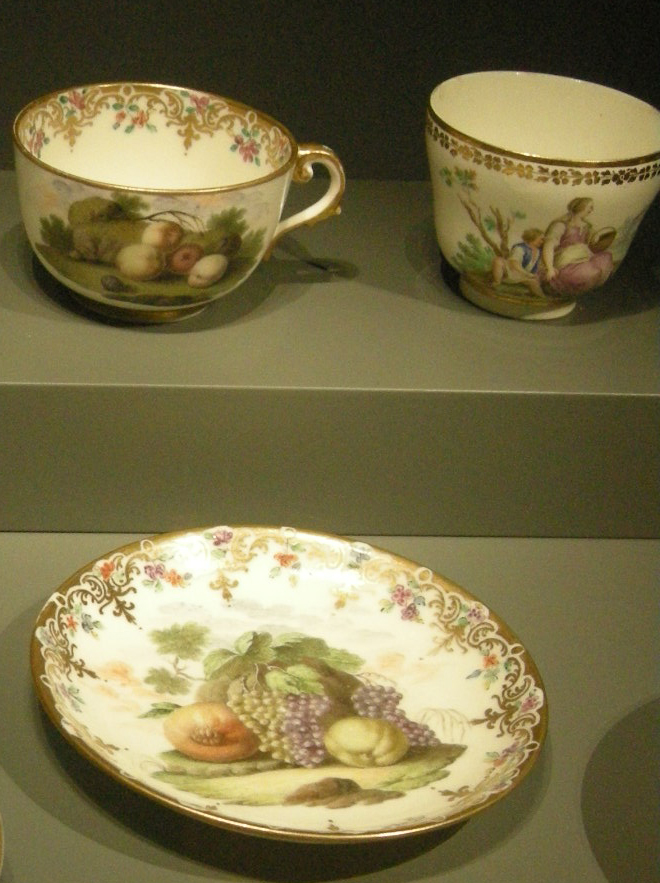 Ngv, porcellane di capodimonte, 1743-59